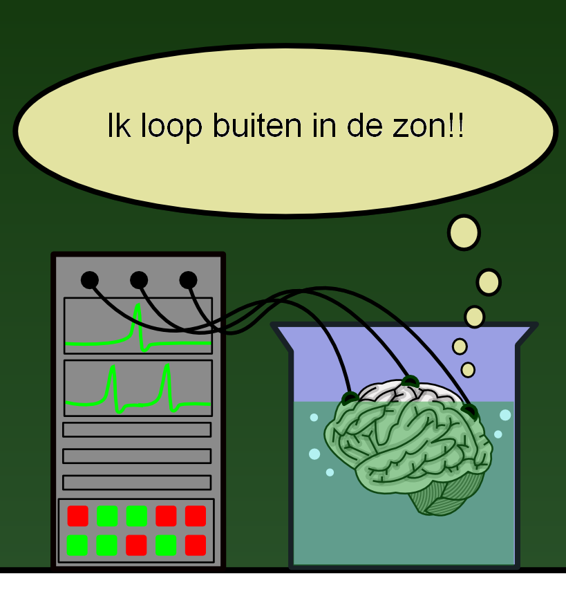 Brein in een vat, gemaakt voor Hersenen in een vat, bewerking van de Engelstalige versie